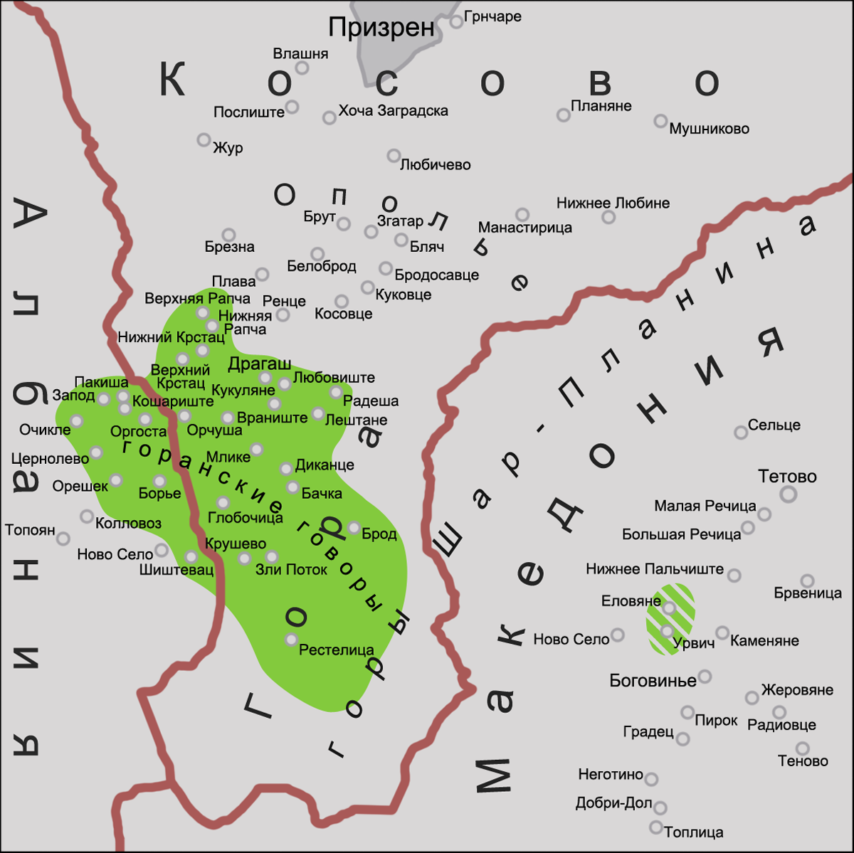 Карта распространения горанских говоров. Источники: Младеновић Р. Горански говор // Горанци, Муслимани и Турци у шарпланинским жупама Србије: проблеми садашњих услова живота и опстанка: зборник радова са «Округлог стола» одржаног 19 априла 2000 године у Српској академији наука и уметности / (организатори) Српска академија наука и уметности, Одбор за проучавање Косова и Метохије (и) Географски институт «Јован Цвијић» / Милан Бурсаћ. — Београд: Географски институт «Јован Цвијић» САНУ, 2000. — P. 52. Ахметовић Б. Самостална општина Гора, потврда самосвојности и основа за очување ентитета и идентитета Горанаца // Горанци, Муслимани и Турци у шарпланинским жупама Србије: проблеми садашњих услова живота и опстанка: зборник радова са «Округлог стола» одржаног 19 априла 2000 године у Српској академији наука и уметности / (организатори) Српска академија наука и уметности, Одбор за проучавање Косова и Метохије (и) Географски институт «Јован Цвијић» / Милан Бурсаћ. — Београд: Географски институт «Јован Цвијић» САНУ, 2000. — P. 55—56. Младенов С. Пътешествие из Македония и Поморавия// Научна експедиция в Македония и Поморавието 1916. — София: Военноиздателски комплекс «Св. Георги Победоносец», Университетско издателство «Св. Климент Охридски», 1993. — P. 184.